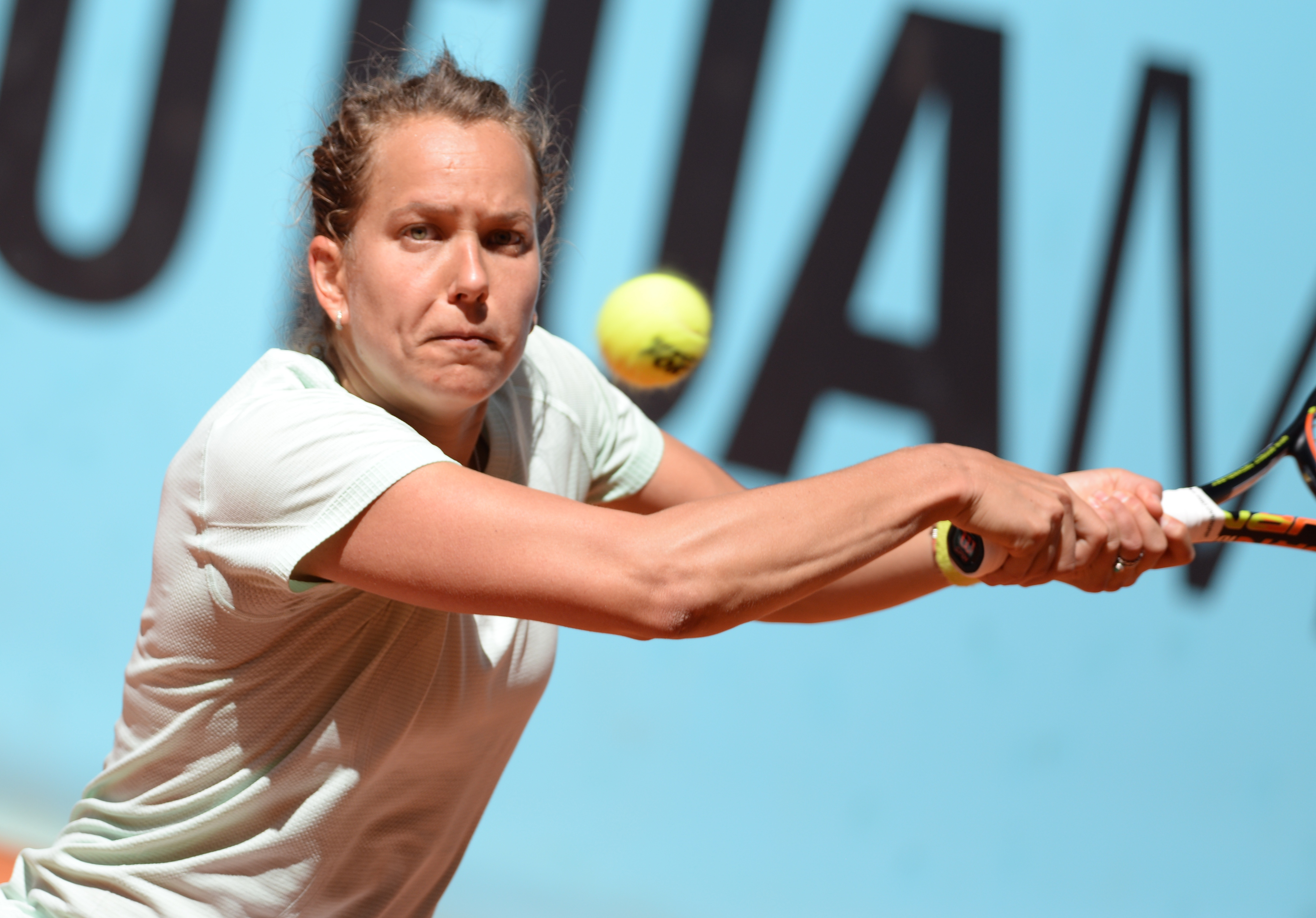 Barbora Strýcová